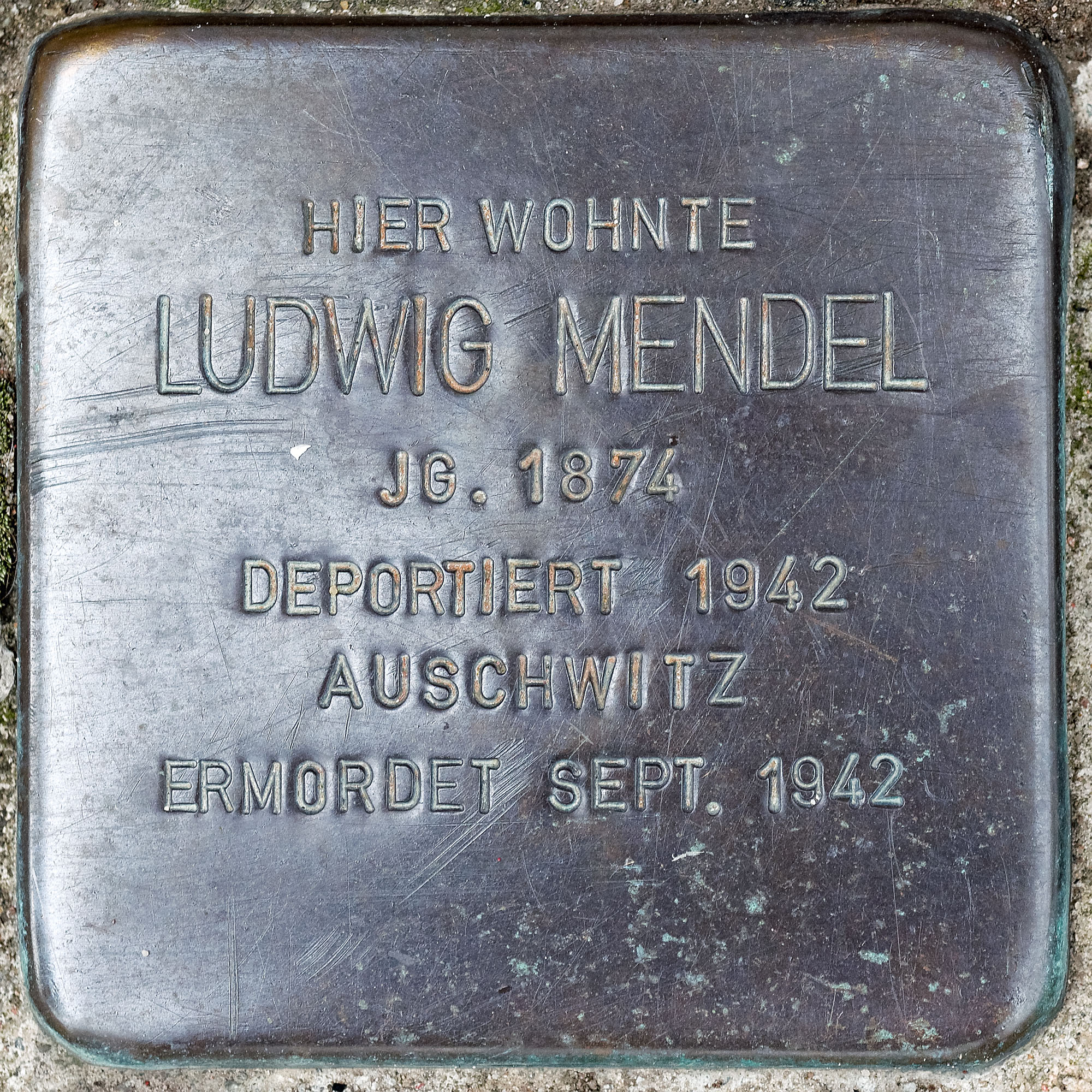 2017 07 16 Stolpersteine Kerken Mendel Ludwig